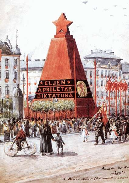 Éljen a proletár diktatúra (Budapest, 1919. május 1.) A Baross szobor fölé emelt piramis. Baky Albert akvarellje.